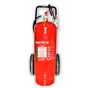 Alat pemadam berat